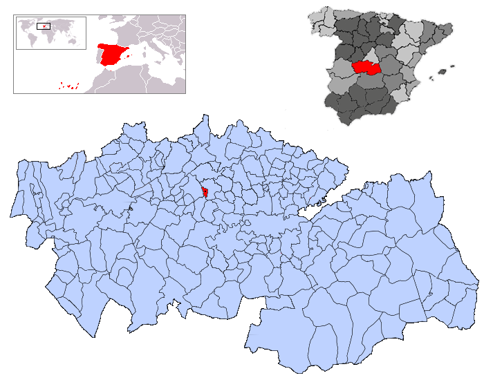 Alcabón en la provincia de Toledo